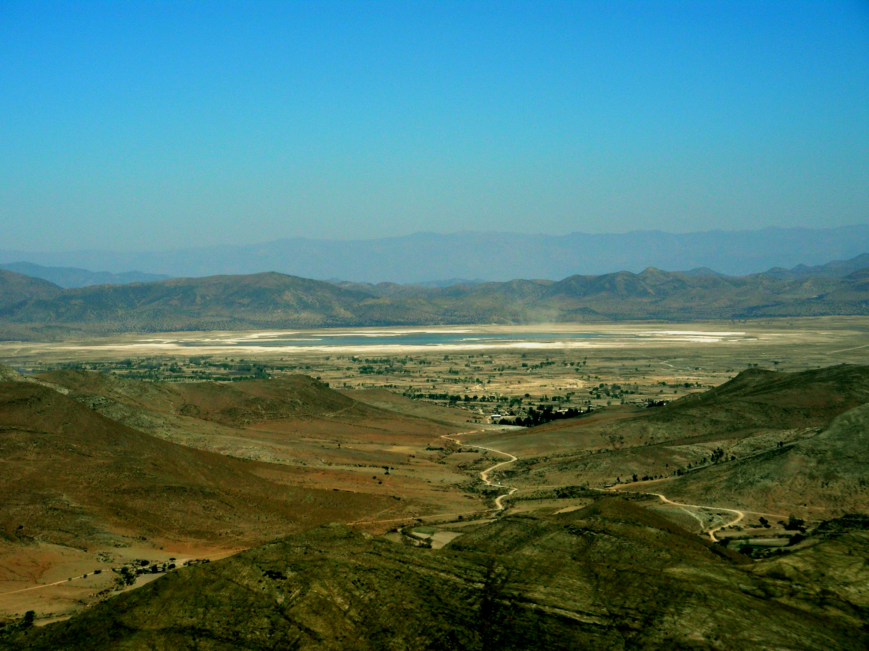 Vista de la Laguna de Culpina. Chuquisaca, Bolivia